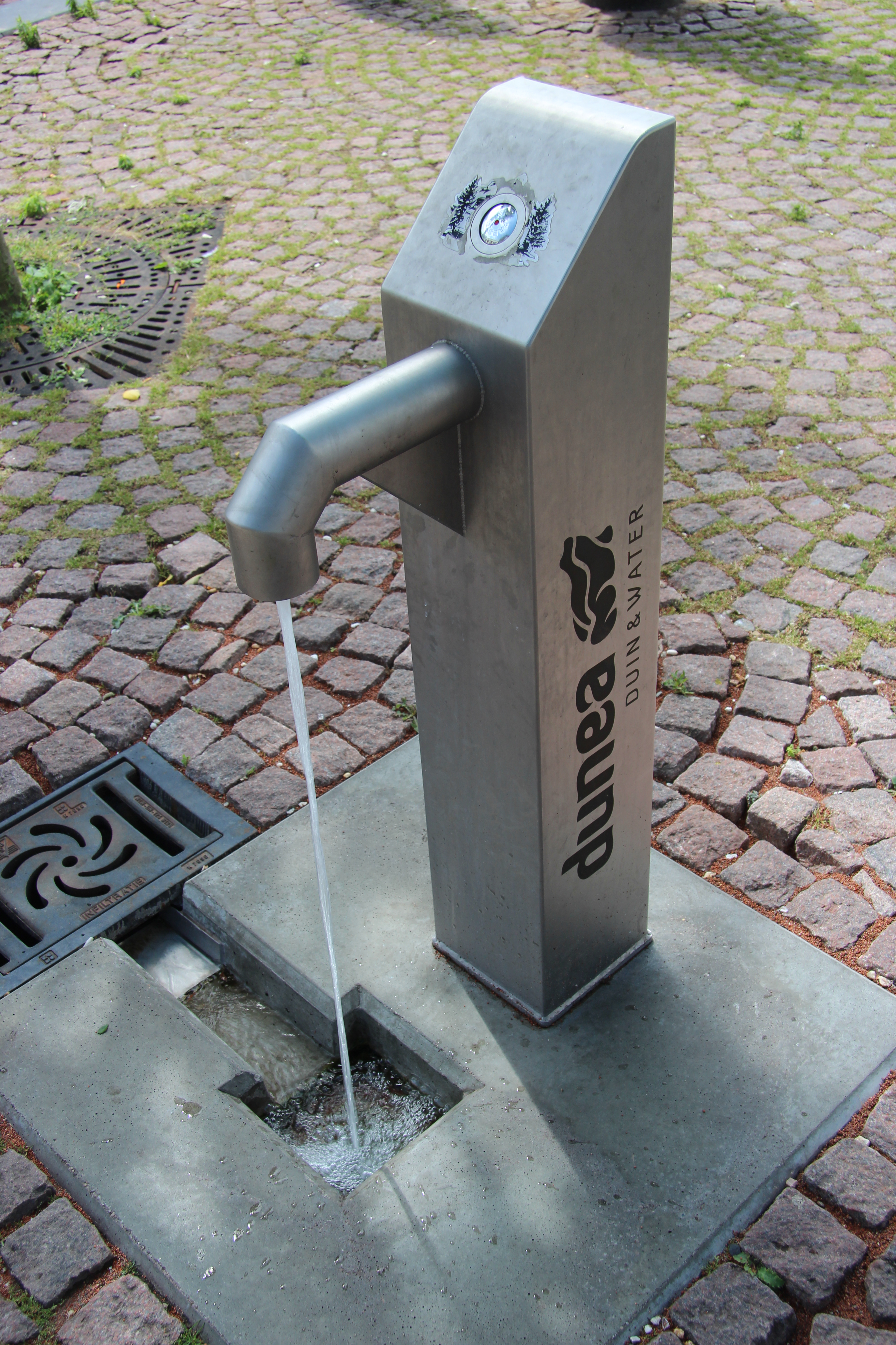 Dunea tapkraan in hartje Wassenaar